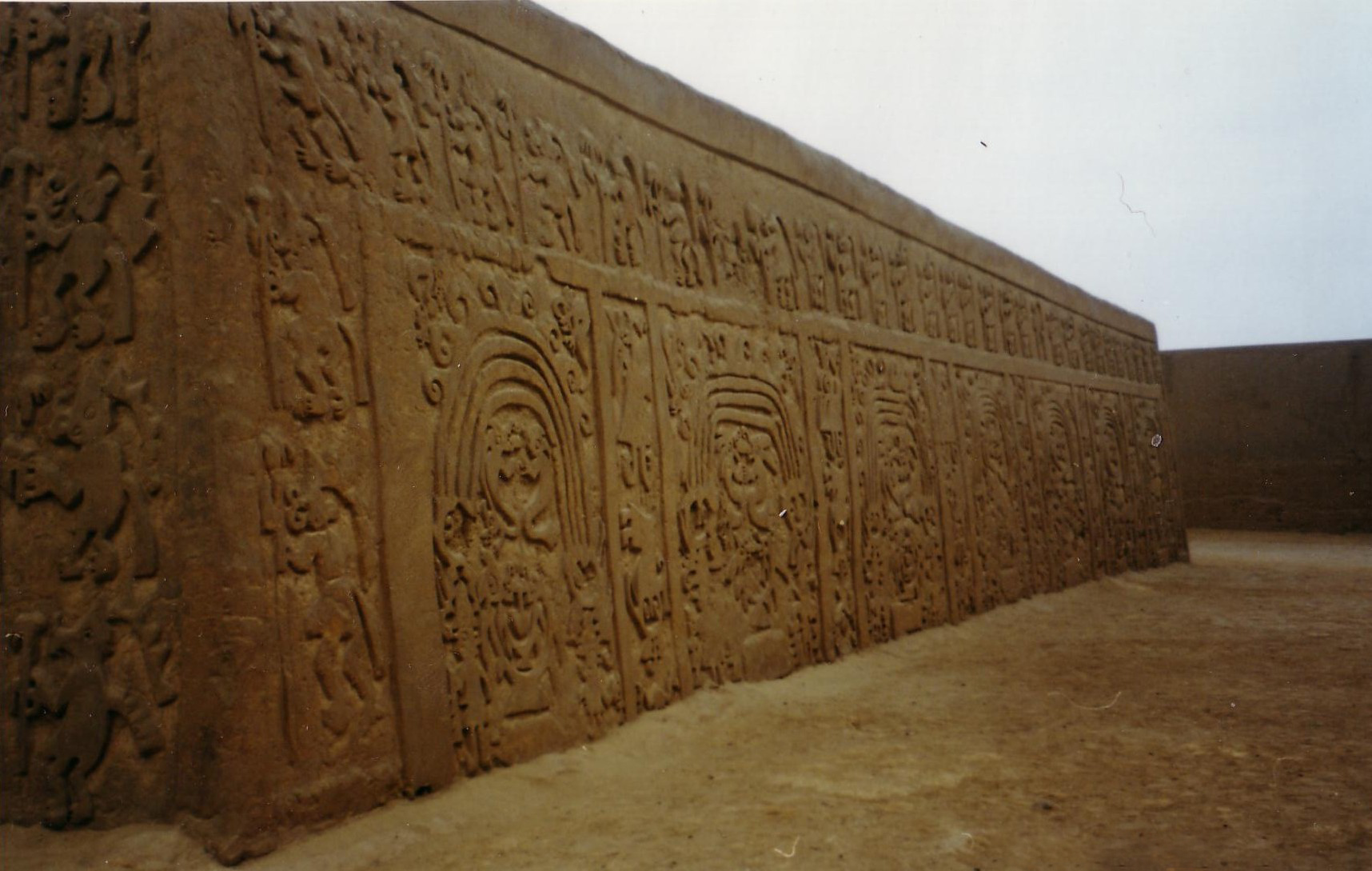 Huaca del Dragon, Trujillo